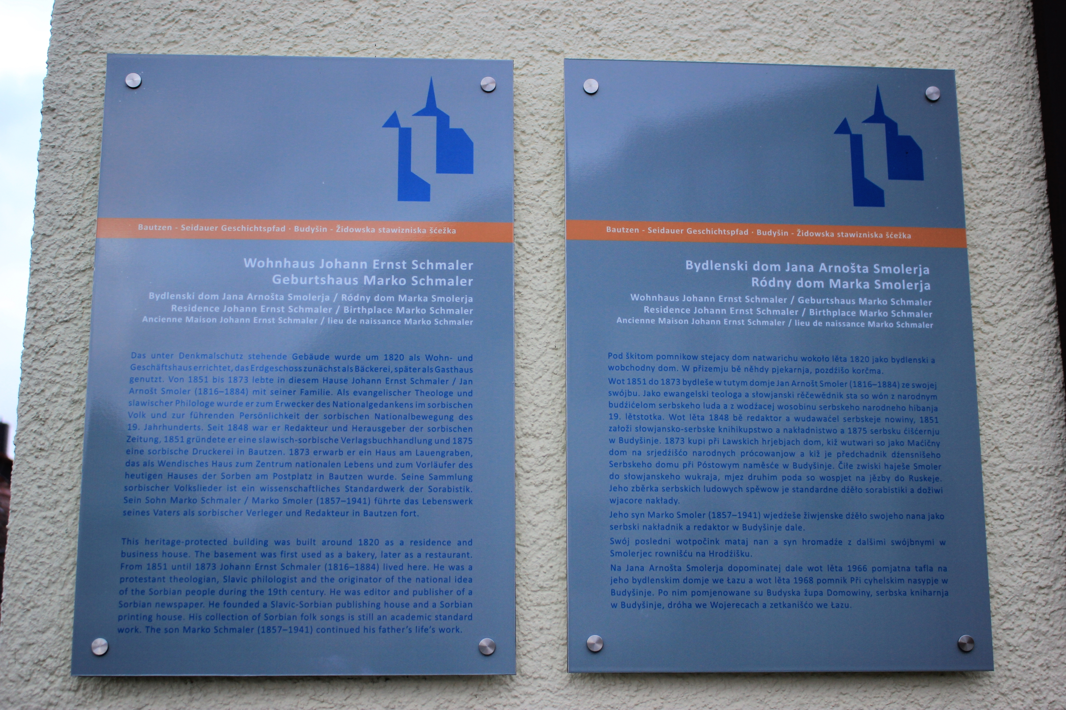 Hornjoserbsce: Informaciskej tafli při něhdyšim Smolerjec swójbnym domje na Židowje